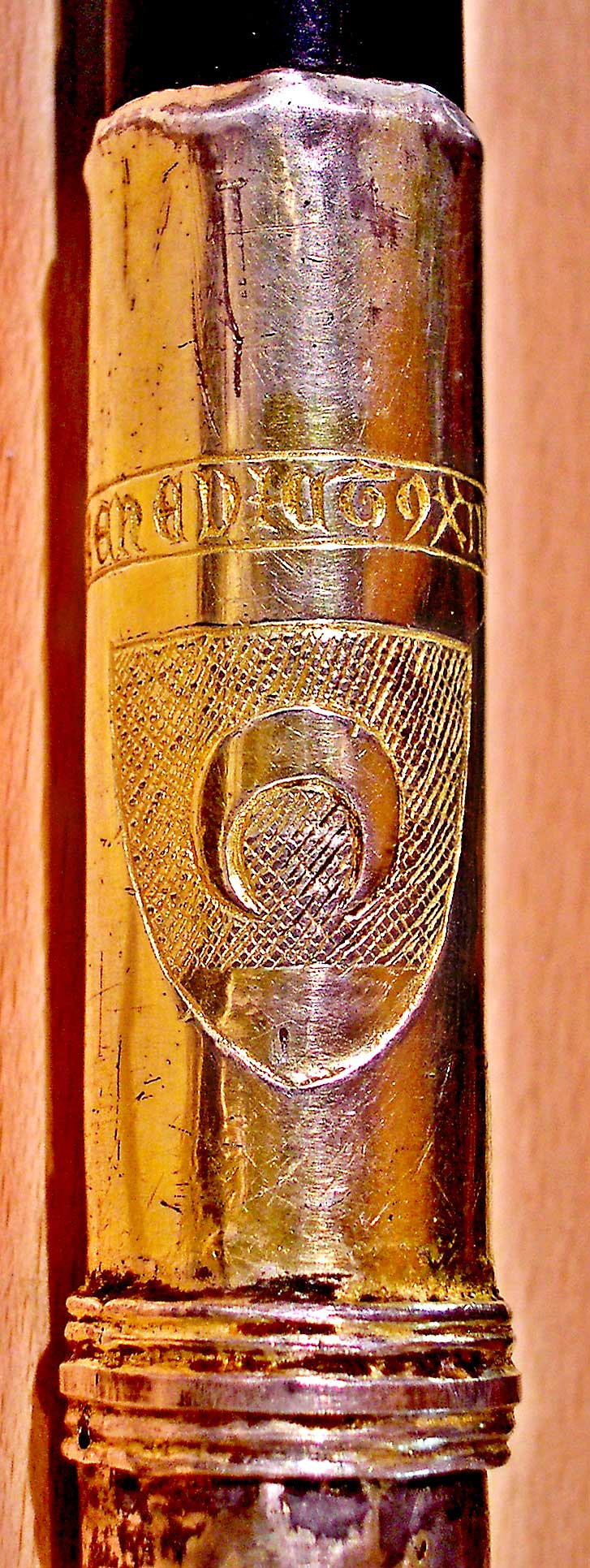 Escudo del Papa Luna en un báculo episcopal del siglo XV perteneciente al Obispo Barrientos. Se conserva en el Museo de las Ferias de Medina del Campo